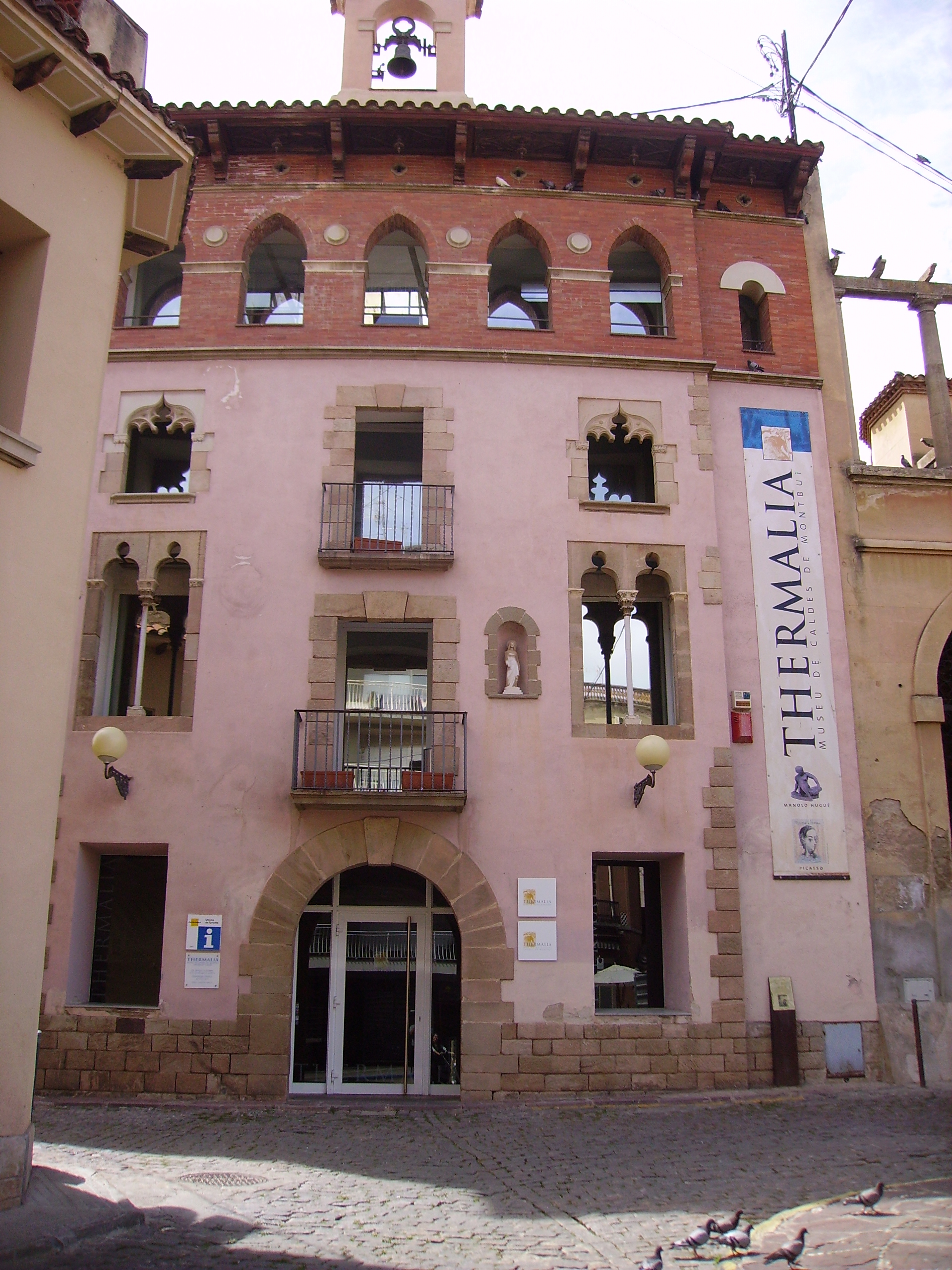 Thermalia, Museu de Caldes de Montbui, Vallès Oriental, Catalunya.